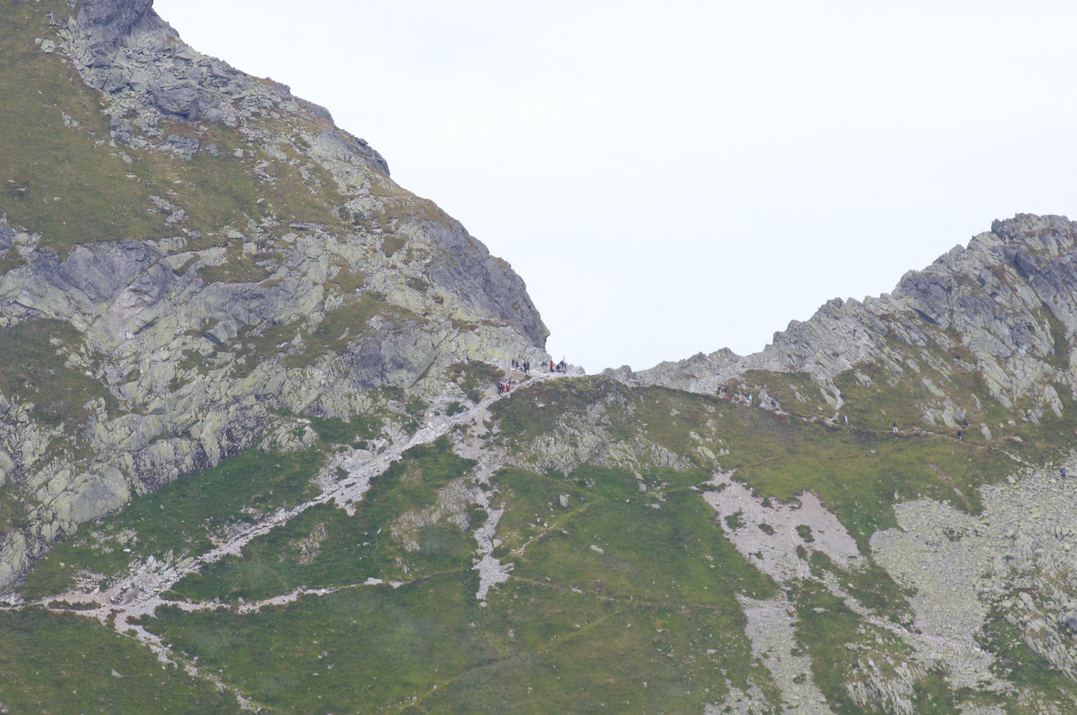 Unikalne zdjęcie Zawratu z Gładkiego Wierchu.